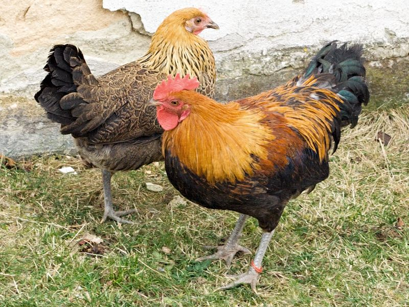 4,5 měsíce starý pár, kuřice a kohout